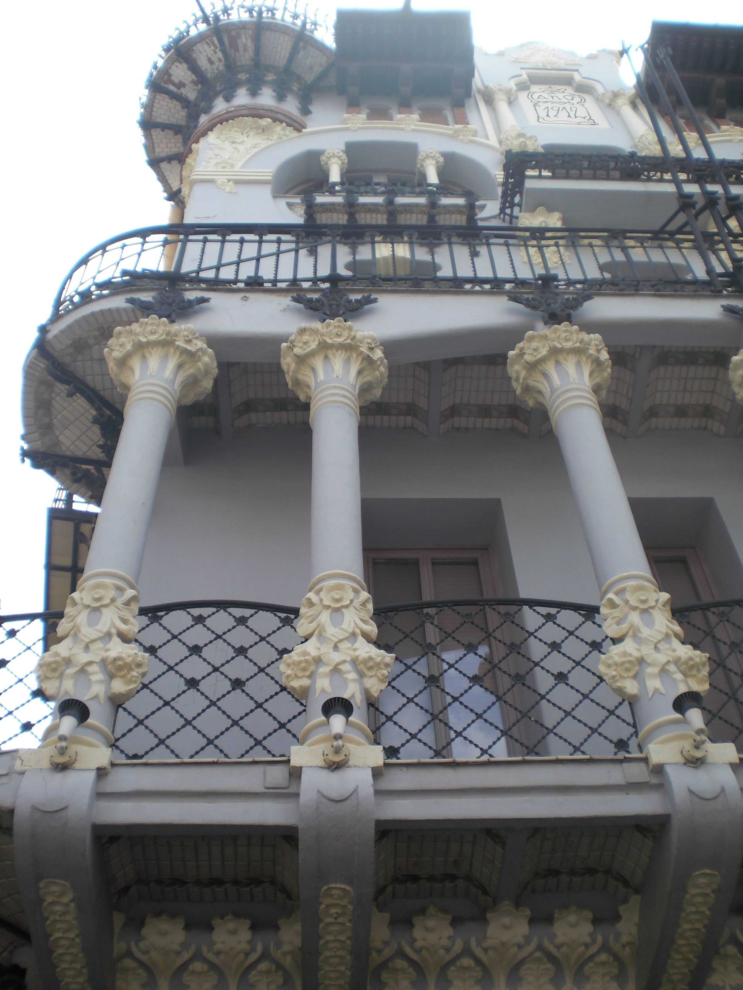 modernisma domo en Teruelo